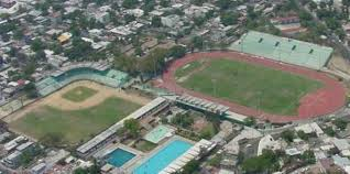 deportiva